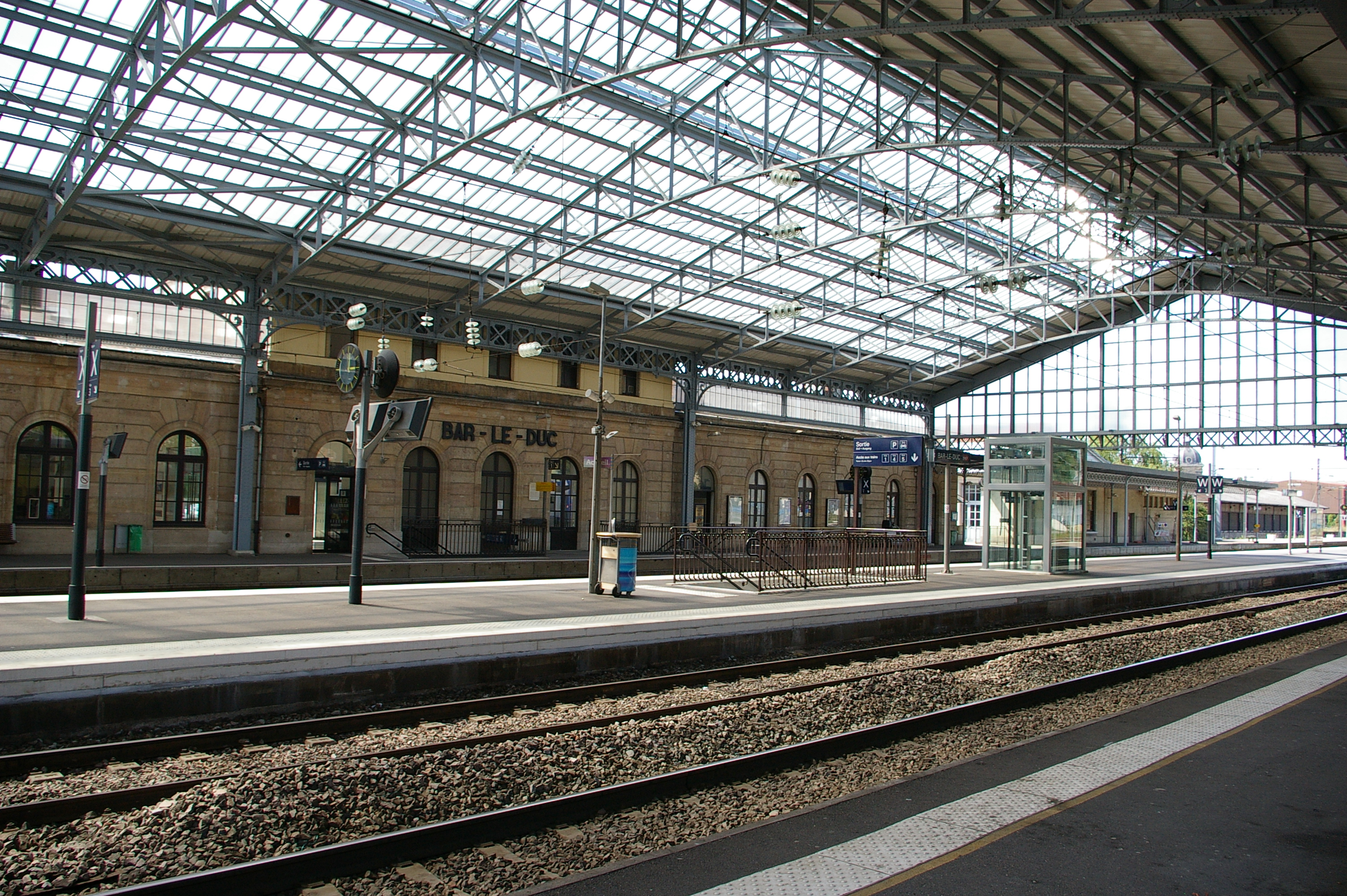 gare de bar le duc. vue générale de la halle depuis le quai 3